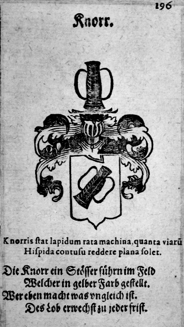 Wappen der (von) Knorr(e) (erloschene hessische Linie der (von) Knorring), Kupferstich